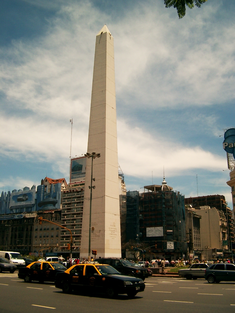 Obelisco de Buenos Aires, Argentina.